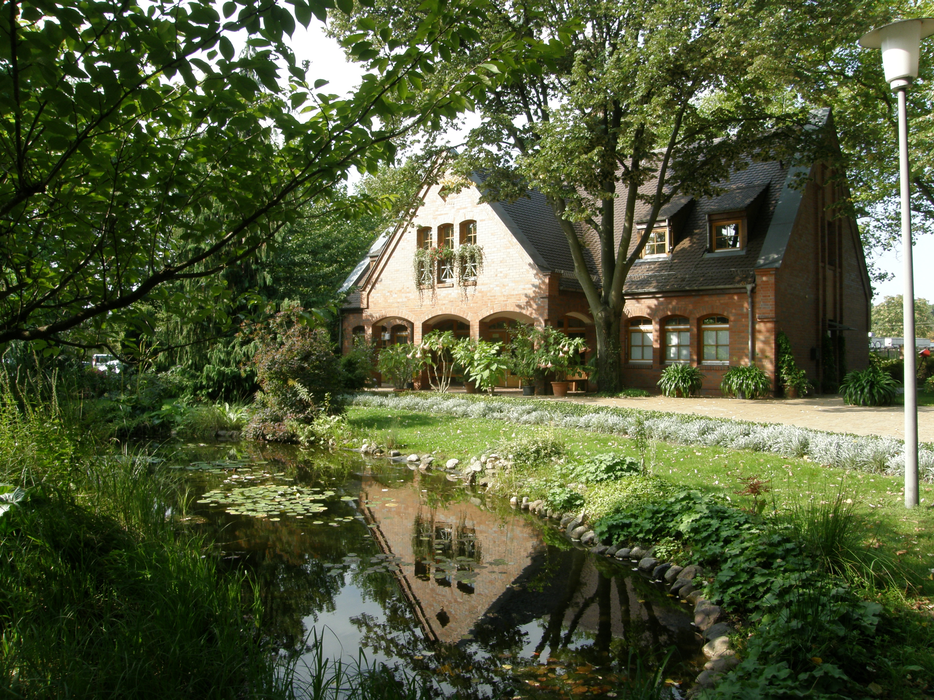 Berlin-Biesdorf, Eingangsbereich